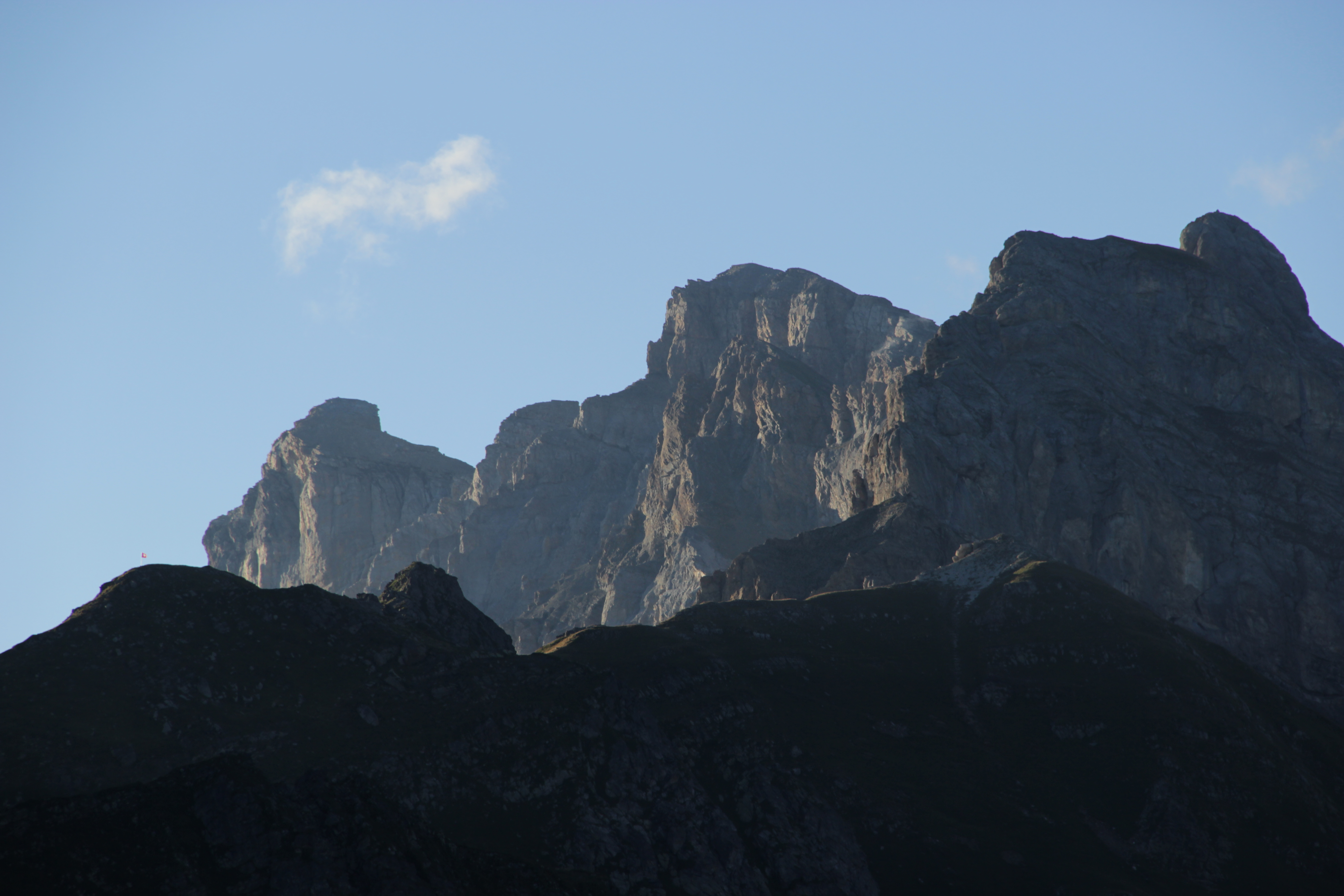 Petite Dent de Morcles, Grande Dent de Morcles and Six Tremble